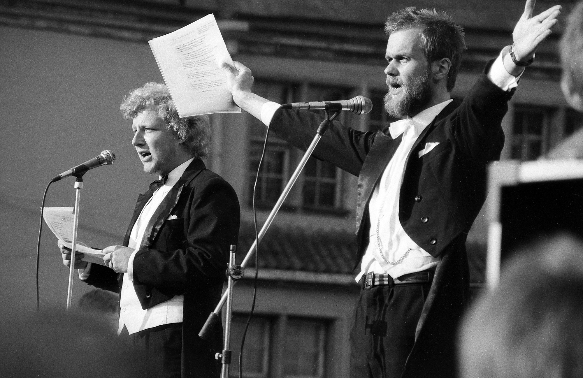 Peeter Kaljumäe ja Peeter Kaber, ansambel Talong 89